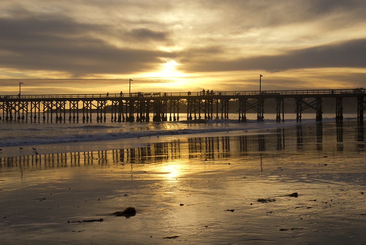 Goleta Pier